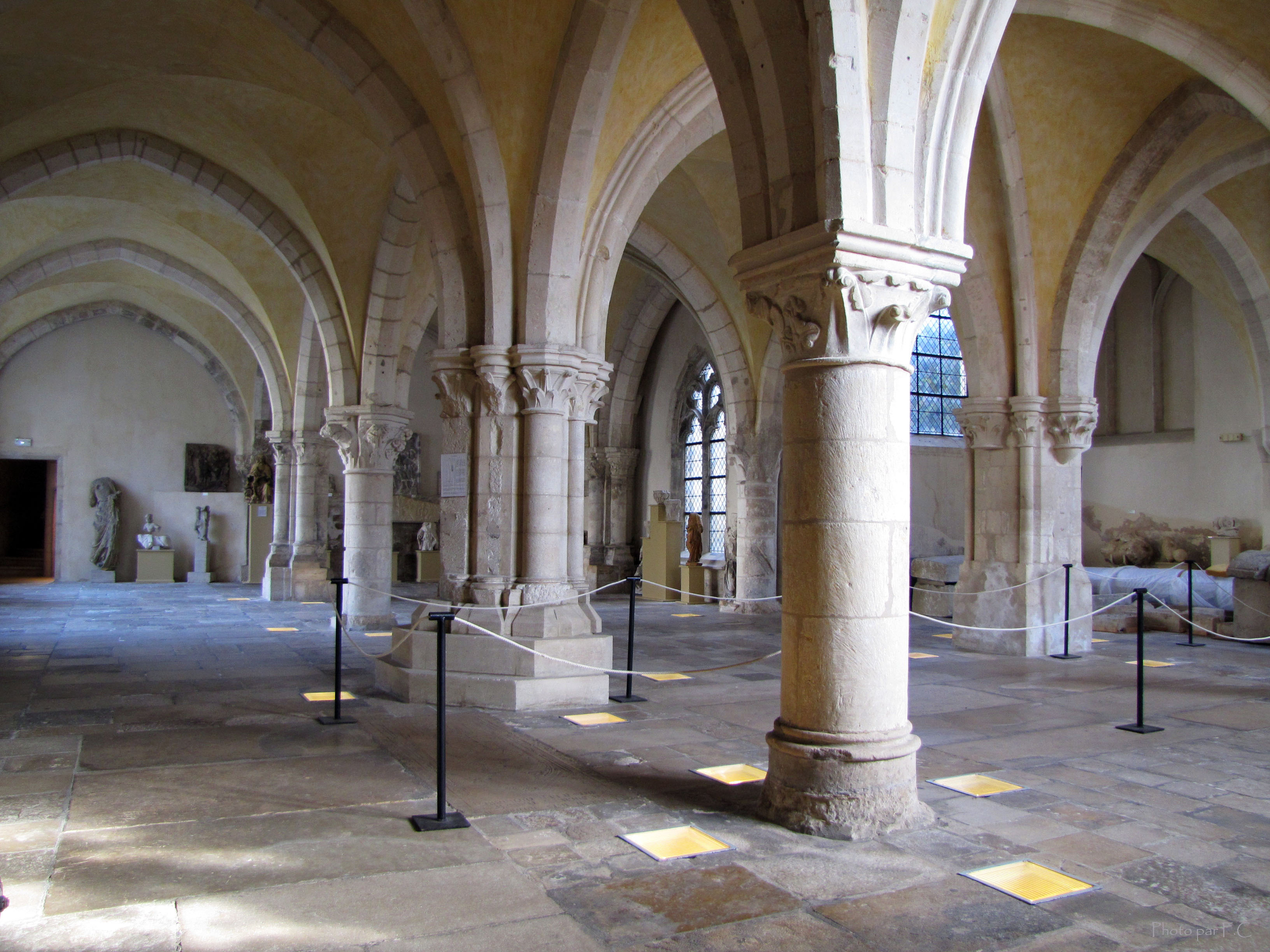 Ancienne salle des malades de l'ancienne Maison-Dieu, cette pièce est l'actuelle salle lapidaire du musée.